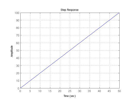 Step Response Diagram (I, K = 2)